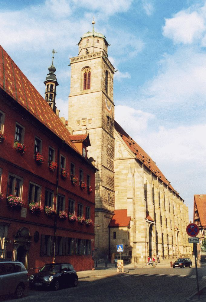 Dinkelsbühl Georgskirche Fotografiert im Sommer 2003